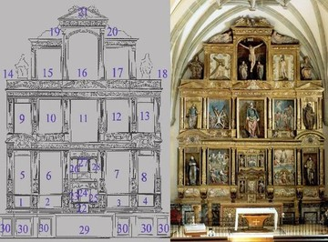 retablo de la iglesia de san Andrés, Huerga de Garaballes